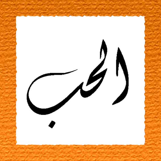 al-hubb